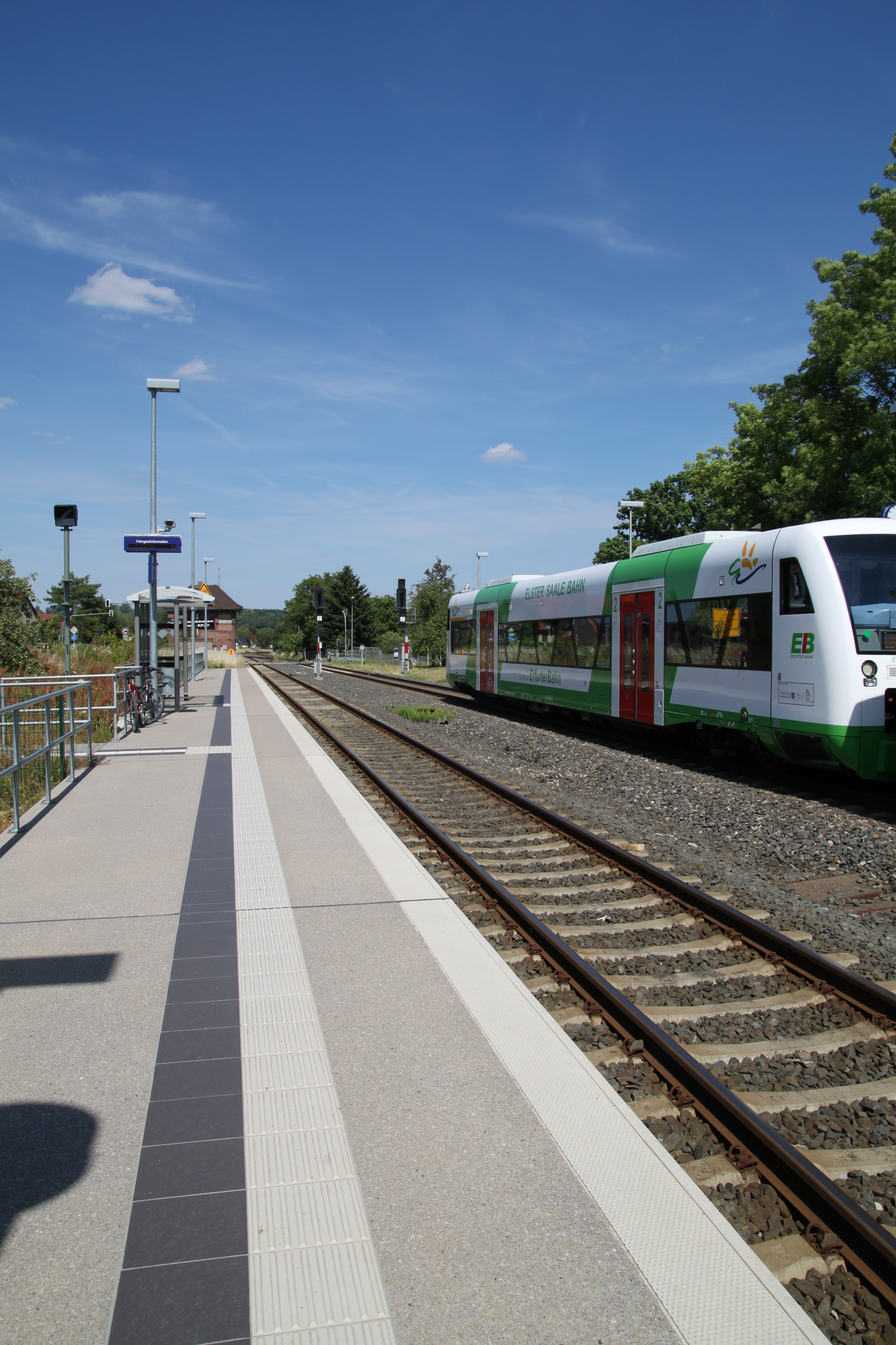 Personenbahnhof Großschwabhausen mit Bahn